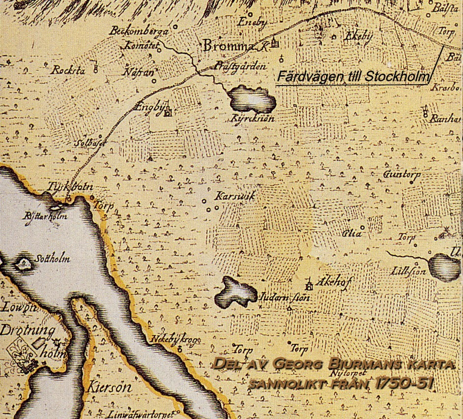 Del av Georg Biurmans karta över Stockholm med omgivning, visande "Bromma"